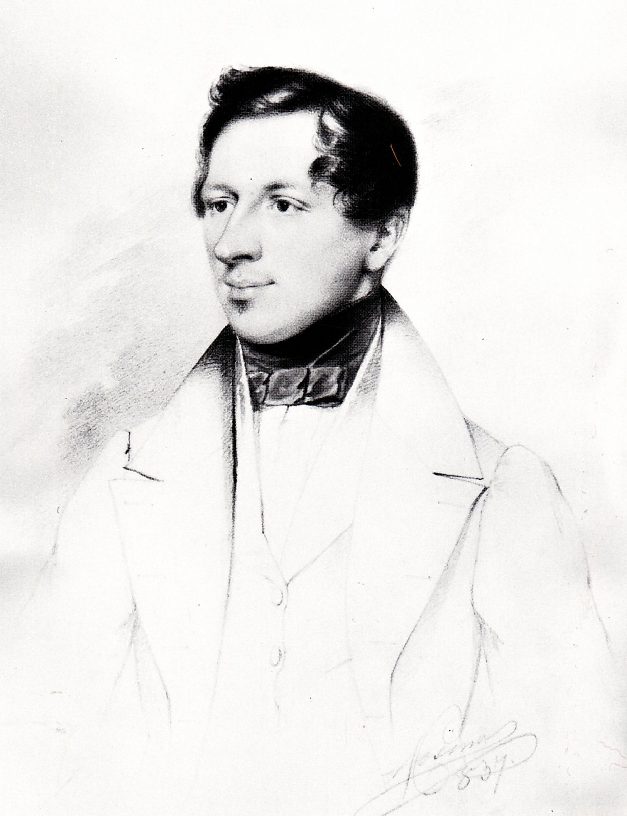 Kozina Sándor: Pulszky Ferenc portréja